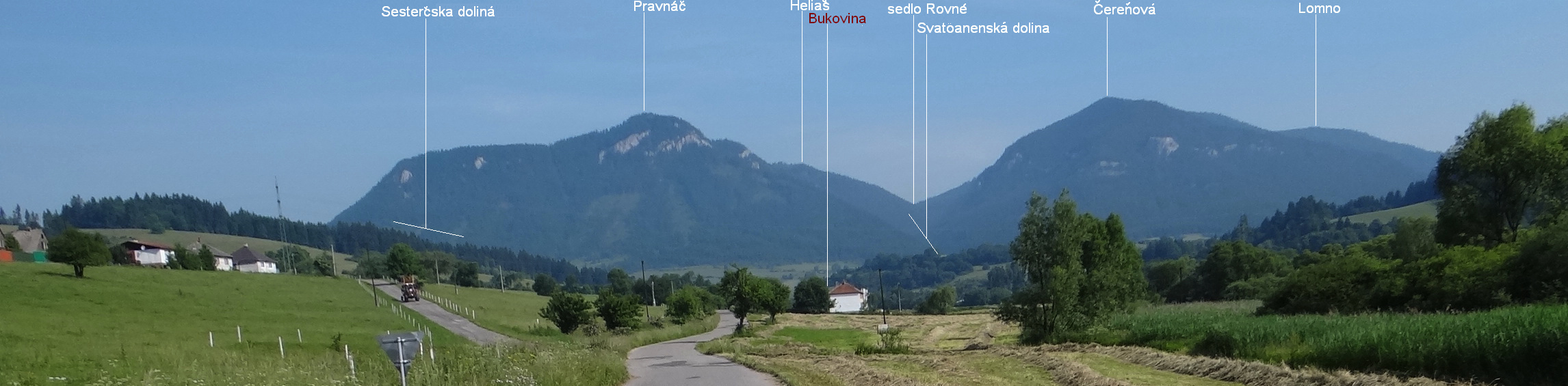 Widok z szosy przy rozdrożu do Bukoviny